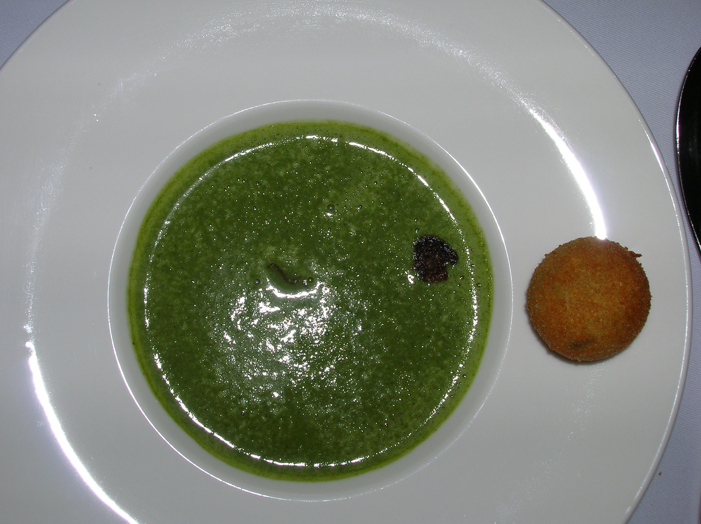 מרק בקפריס